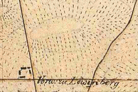 Karte von Neulöwenberg als Vorwerk zu Löwenberg, Kreis Ruppin, Provinz Brandenburg, 1825